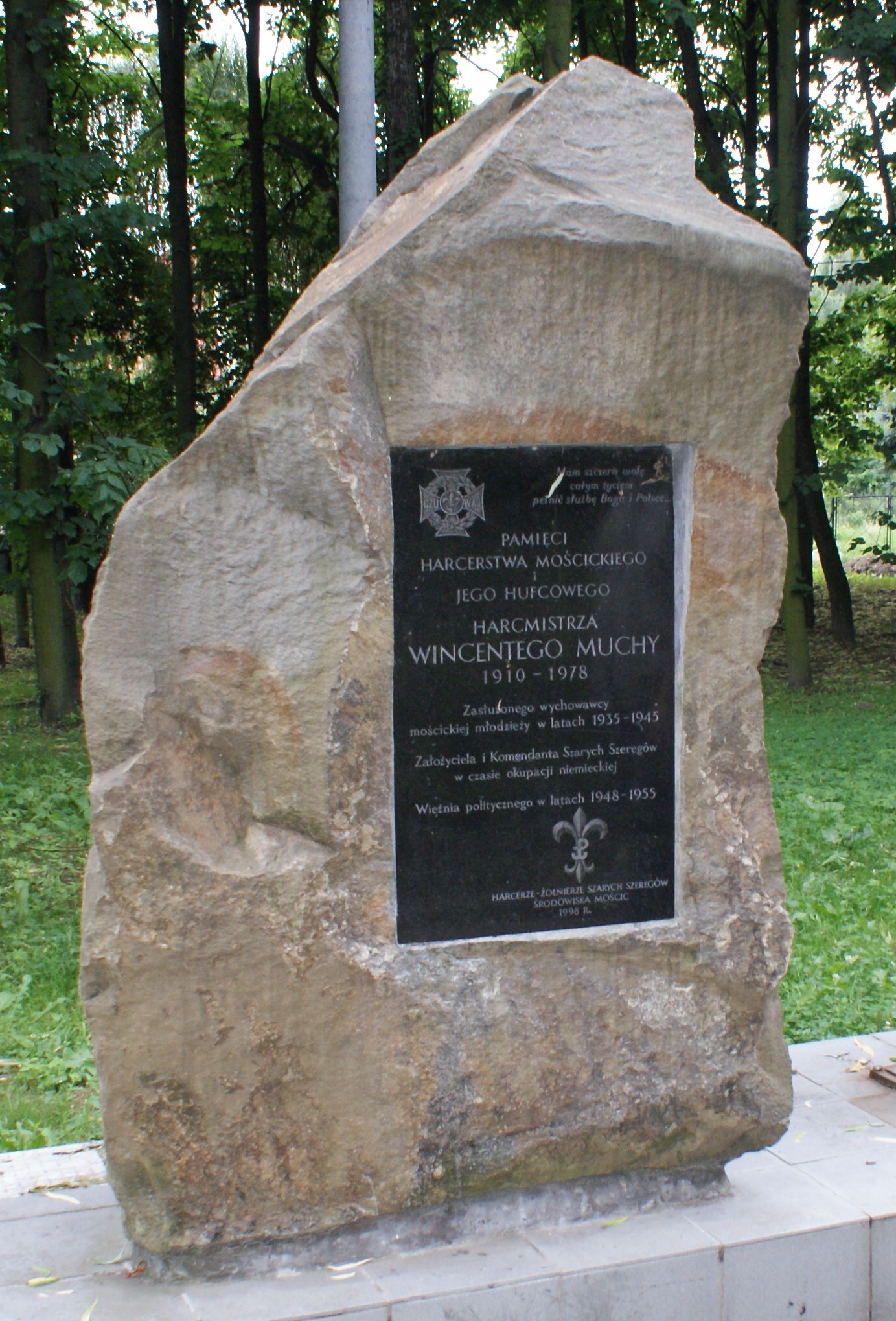 Tarnów - pomnik harcmistrza Wincentego Muchy, komendanta Szarych Szeregów Hufca Mościce